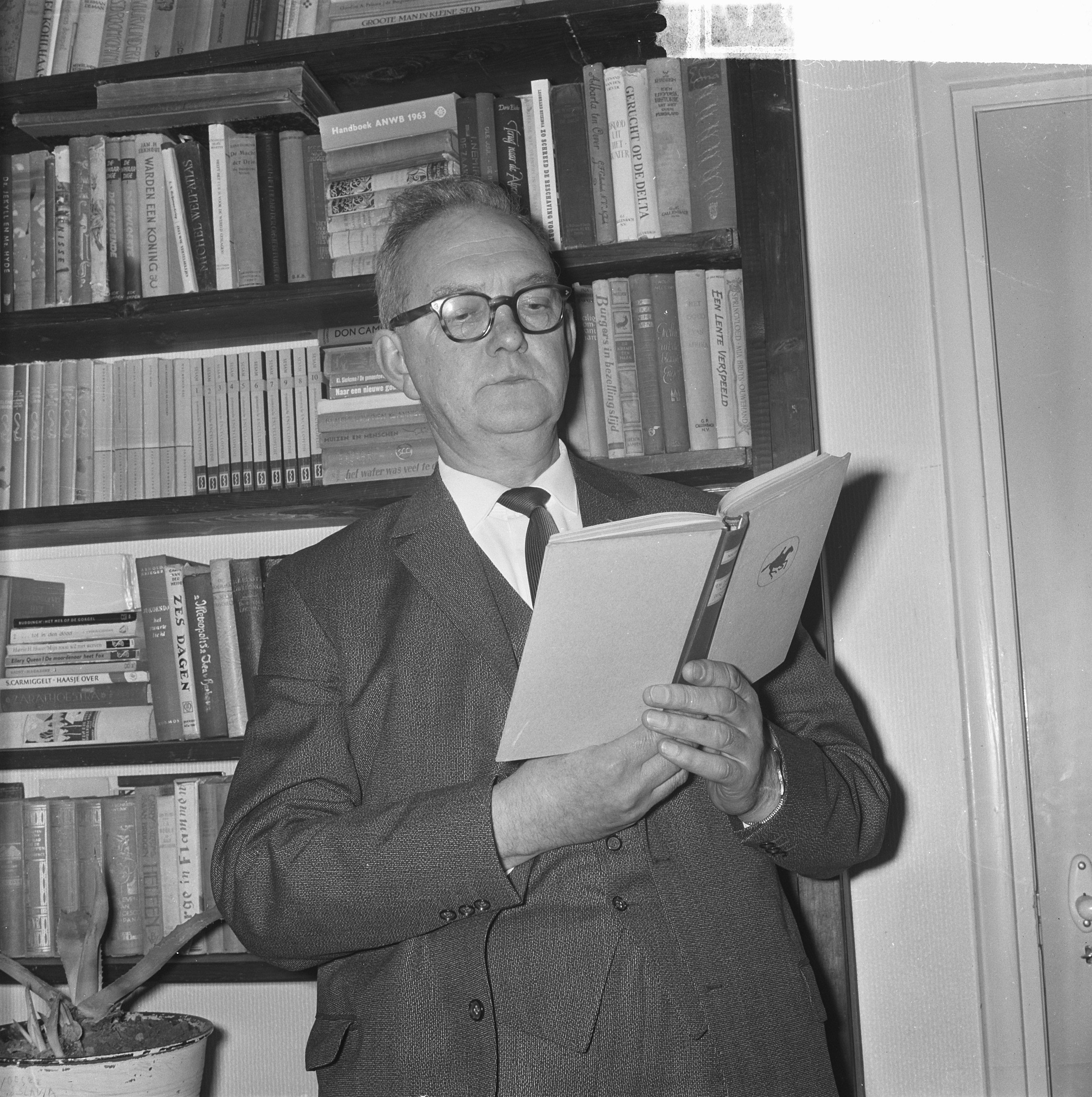 Collectie / Archief : Fotocollectie Anefo Reportage / Serie : [ onbekend ] Beschrijving : Prinses Ireneschool in St. Maartensdijk op Tholen veranderde haar naam. De burgemeester D. C. Bouwense van Maartensdijk Annotatie : In "Juliana van Stolbergschool" vanwege de Irene-kwestie (prinses Irene werd rooms-katholiek) Datum : 3 februari 1964 Locatie : Maartensdijk, Tholen, Zeeland Trefwoorden : burgemeesters, scholen Persoonsnaam : Bouwense, D.C. Instellingsnaam : Prinses Ireneschool Fotograaf : Koch, Eric / Anefo Auteursrechthebbende : Nationaal Archief Materiaalsoort : Negatief (zwart/wit) Nummer archiefinventaris : bekijk toegang 2.24.01.03 Bestanddeelnummer : 916-0227